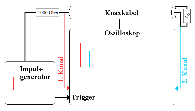 Impulse bei richtig belastetem Kabel, Wellenimpedanz, Widerstand